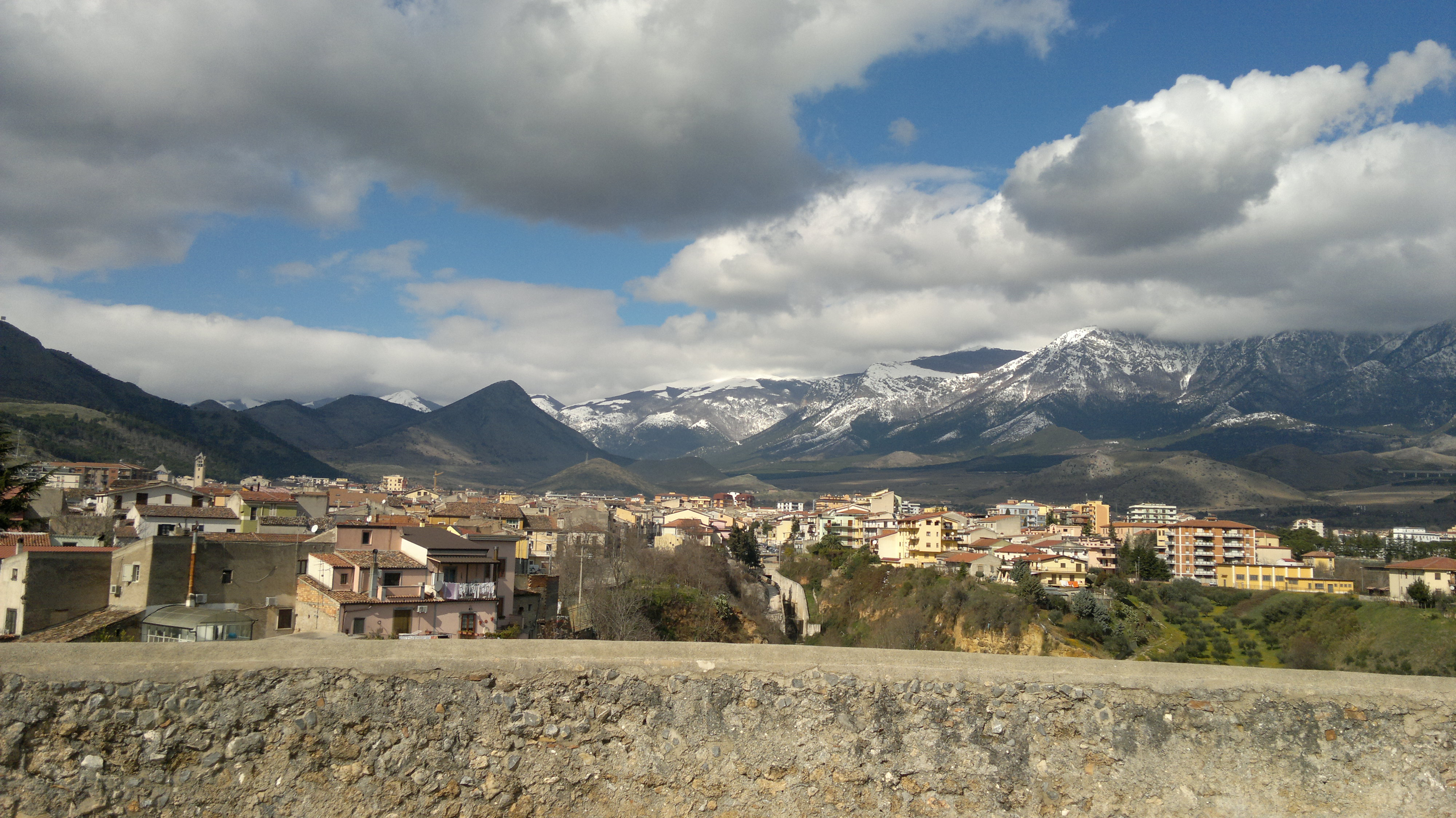 Panorama di Castrovillari (CS) Italy dal Maschio del Castello Aragonese